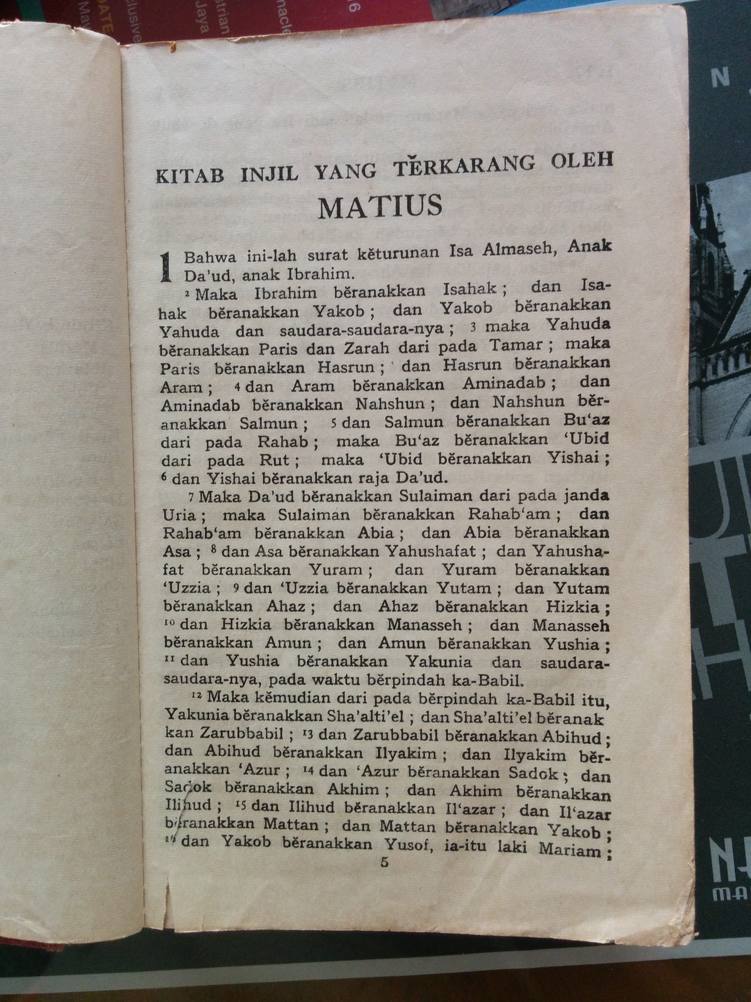 Alkitab Shellabear 1912; Cetakan Semula Tahun 1949; Muka pertama terjemahan Injil Matius.